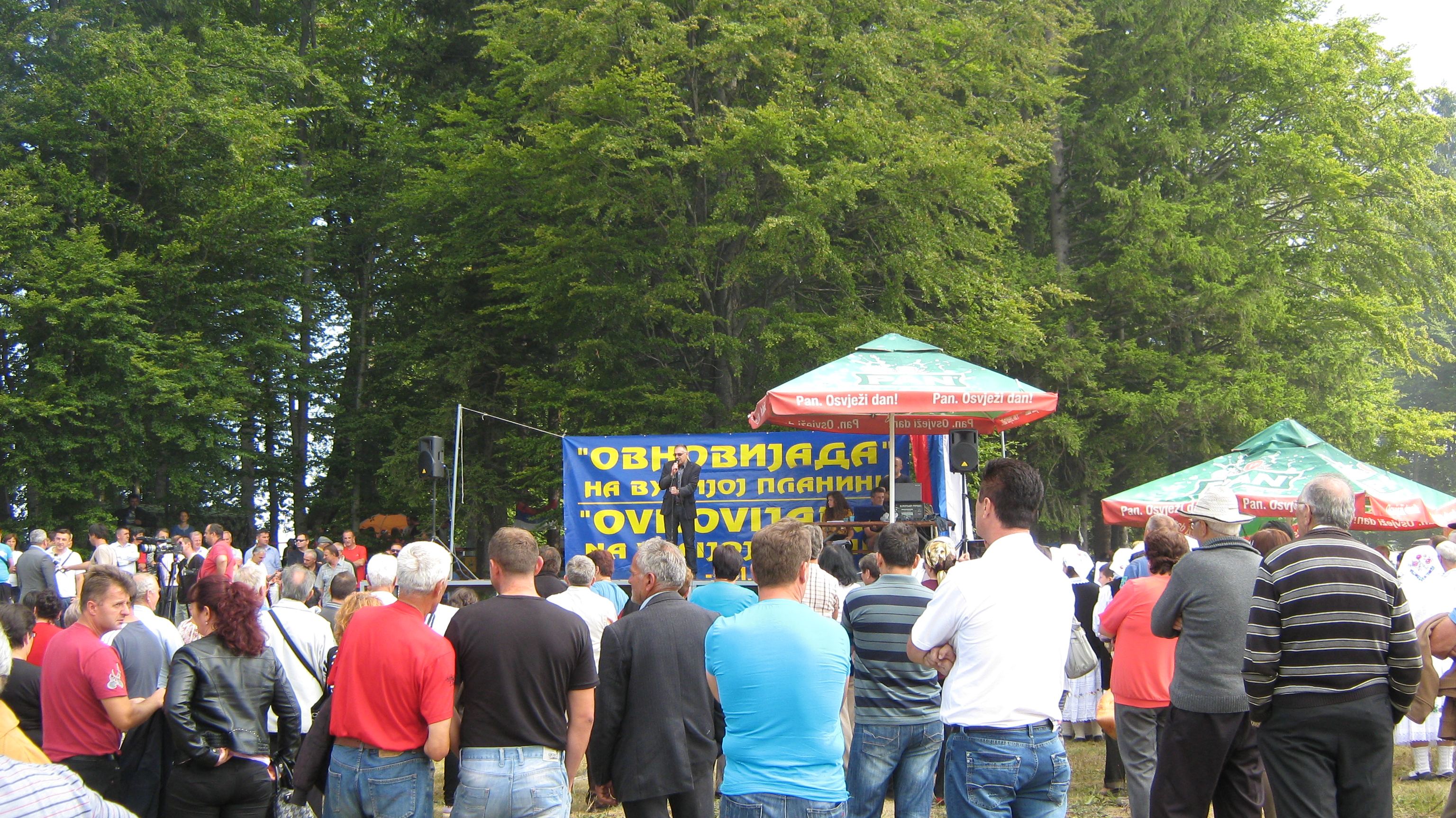 Отварање Овновијаде на Вучјој планини 2013. године